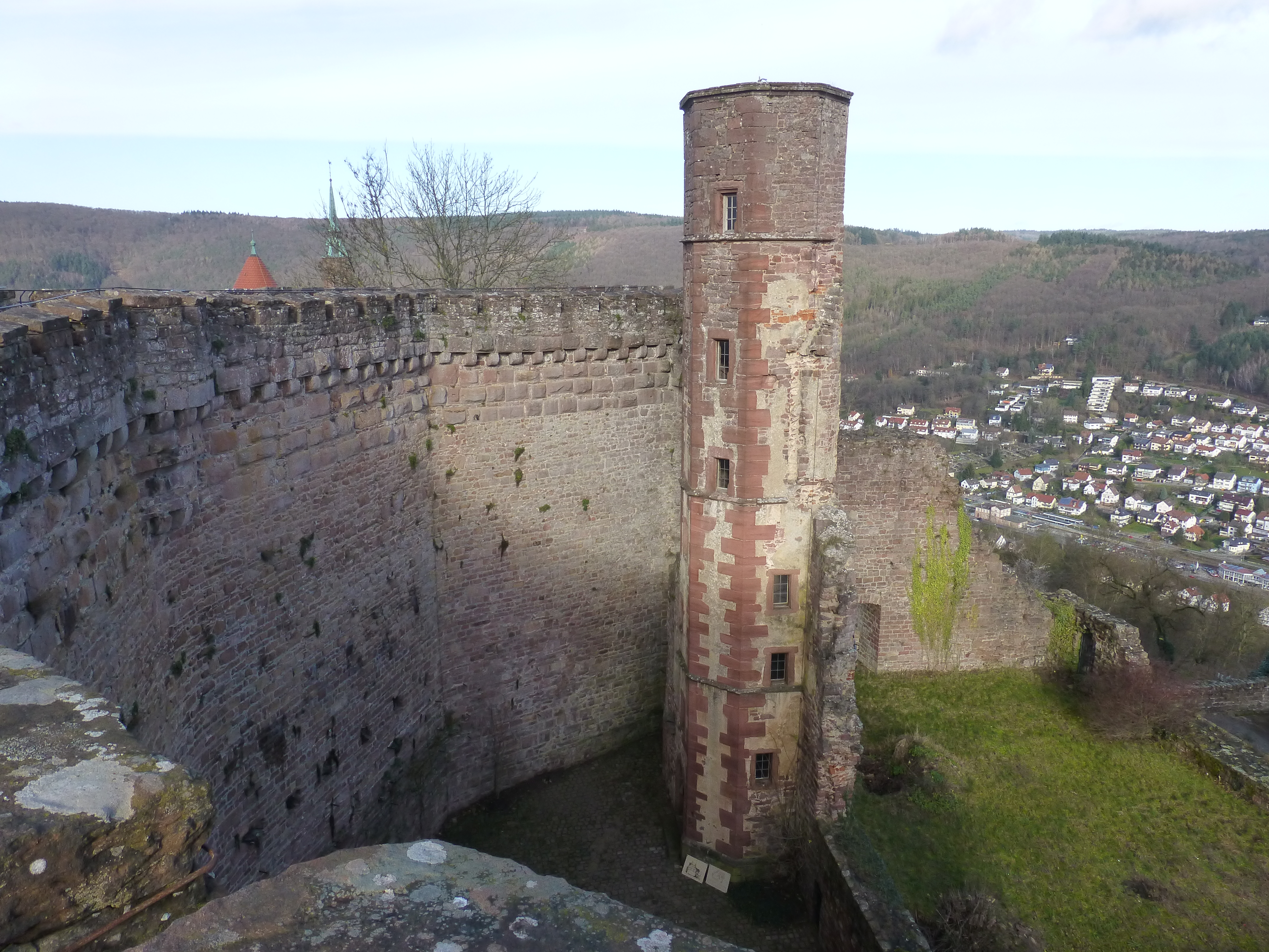 Blick von der Mantelmauer zum Treppenturm; dahinter links die Dachspitzen des stillgelegten Wasserturms und der Katholischen Kirche; rechts Neckarsteinach